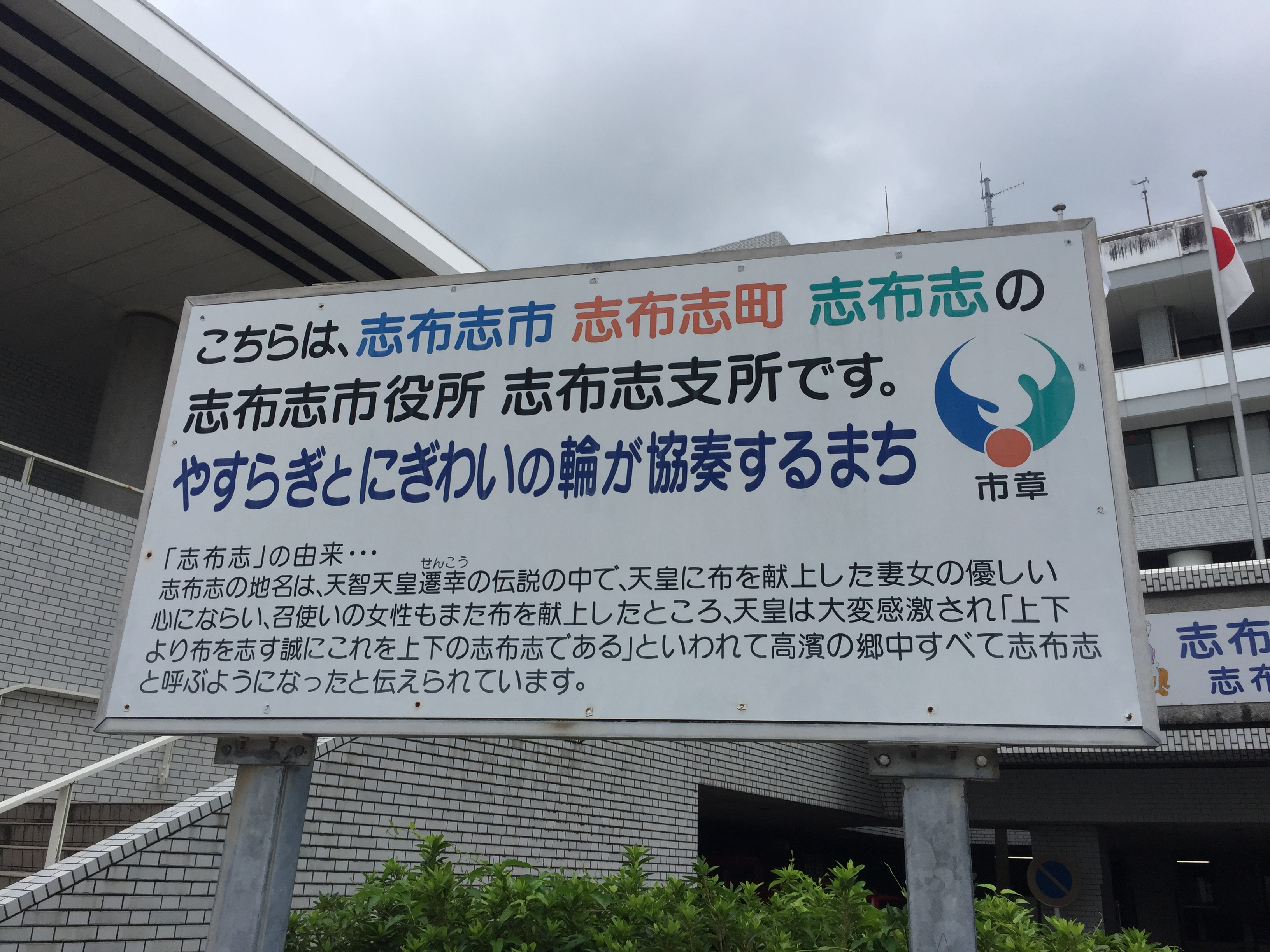 志布志市役所志布志支所にある有名な看板